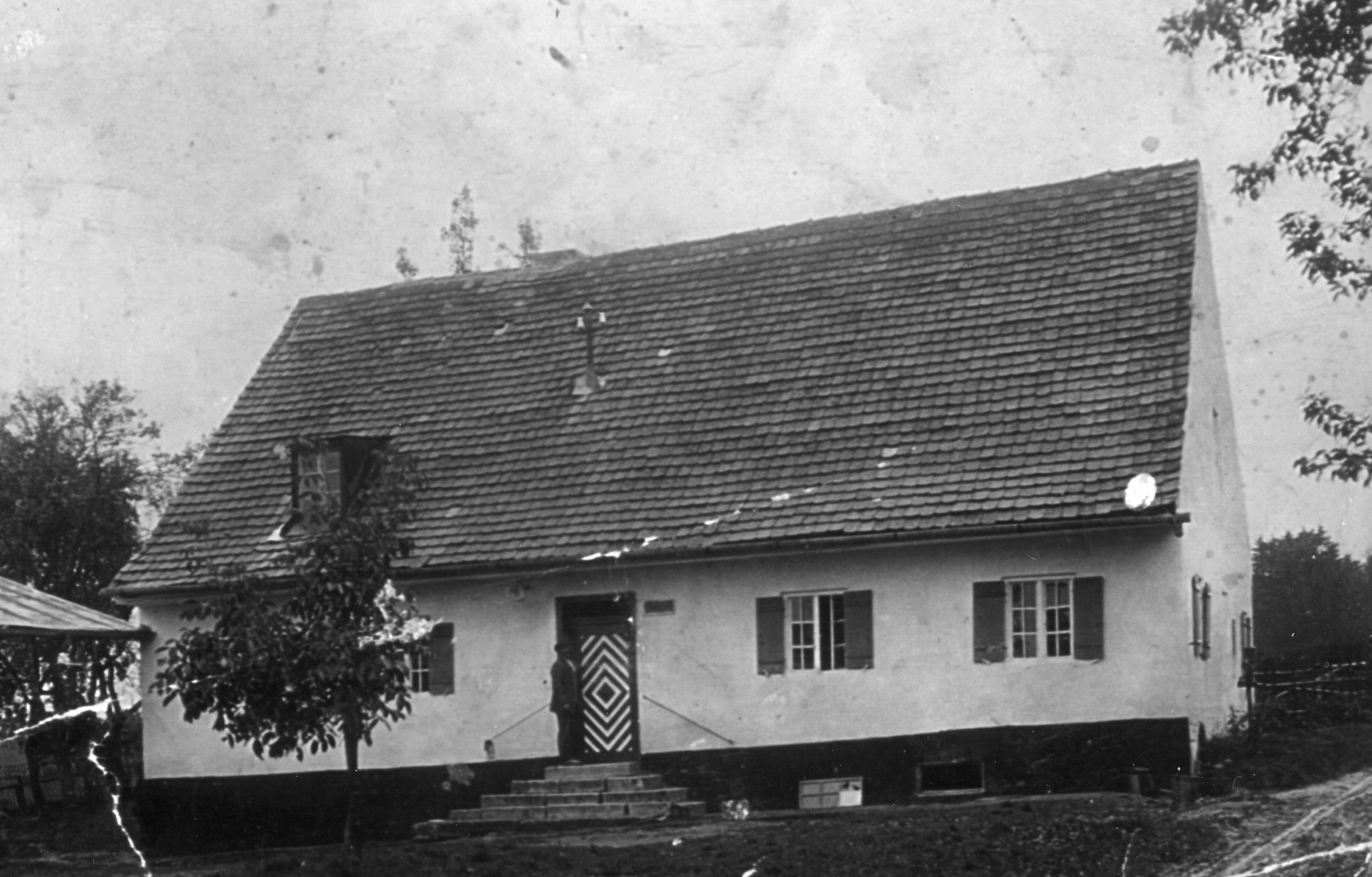 Thann (Jetzendorf) Nr. 4, Wohnhaus